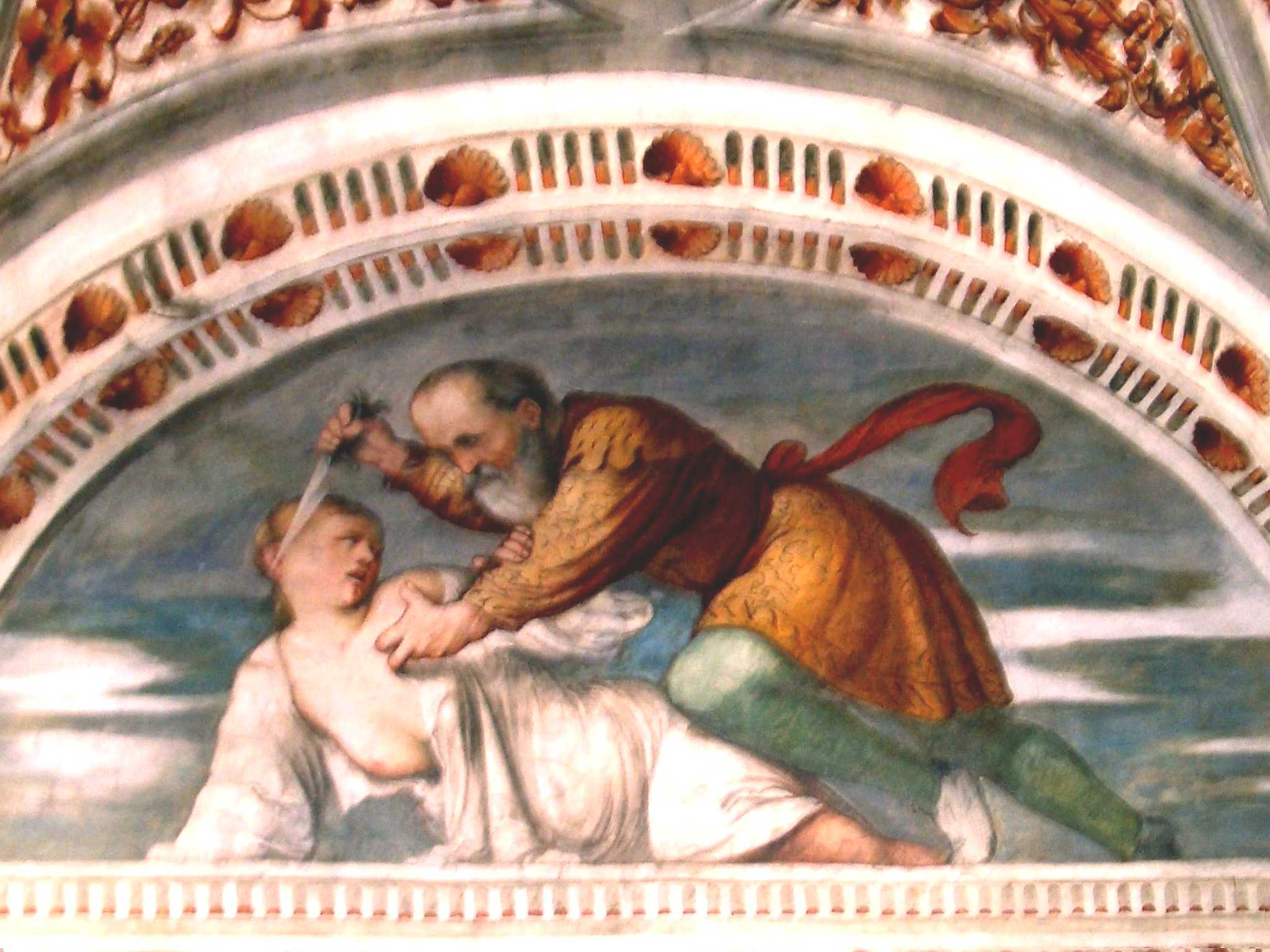 Romanino, The Death of Virginia, 1531-32, Castello del Buonconsiglio, Trento